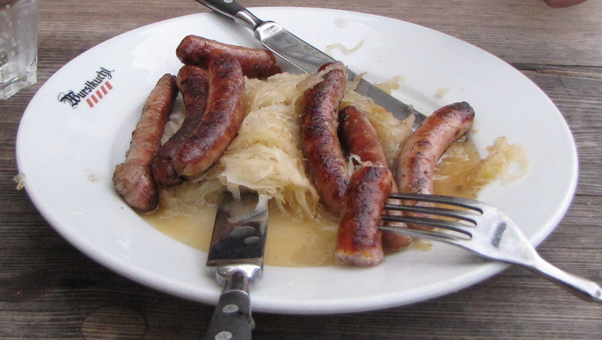 Bratwurst mit Sauerkraut in der Historischen Wurstkuchl in Regensburg in Bayern, Deutschland.